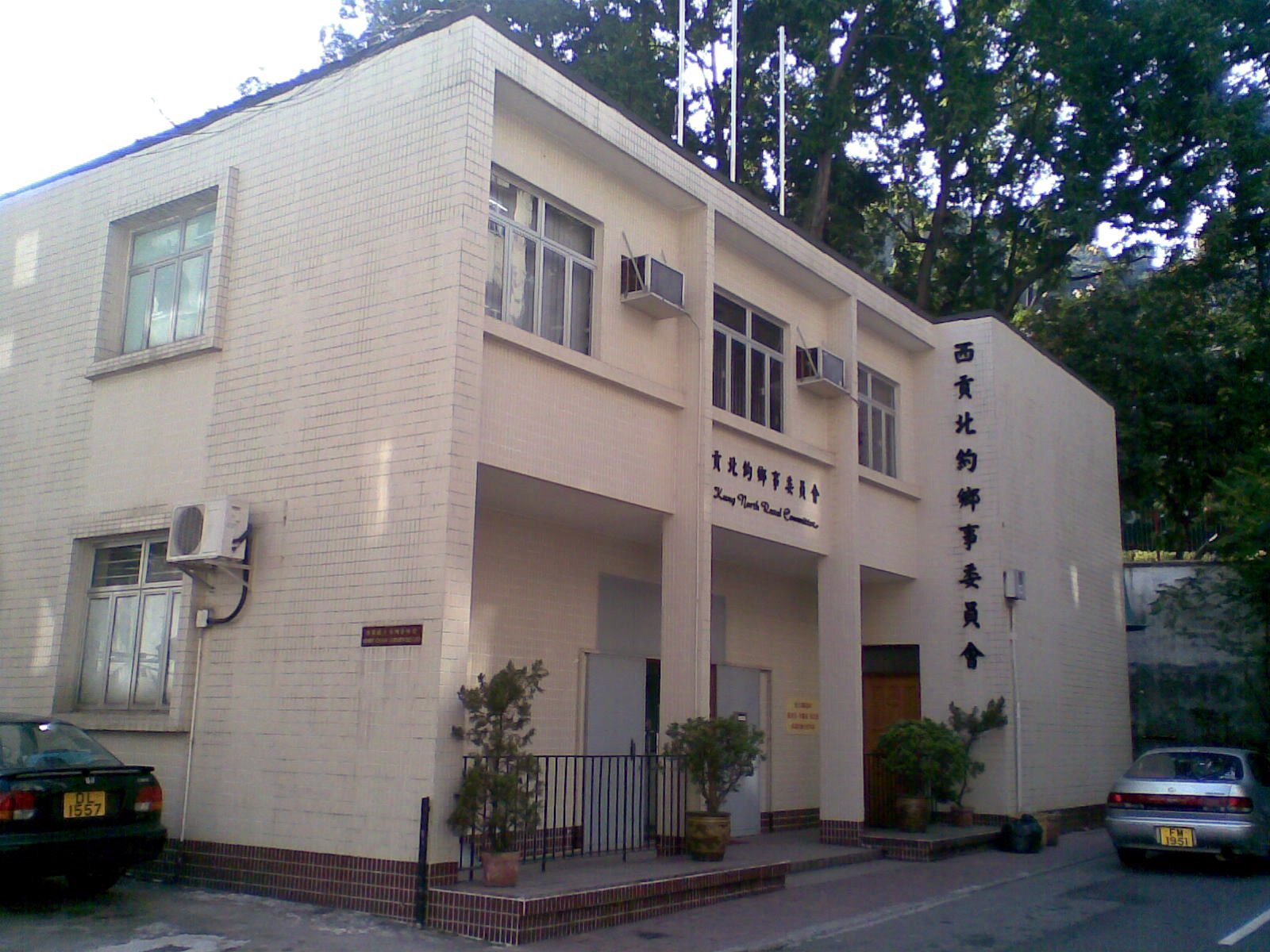 西貢北約鄉事委員會